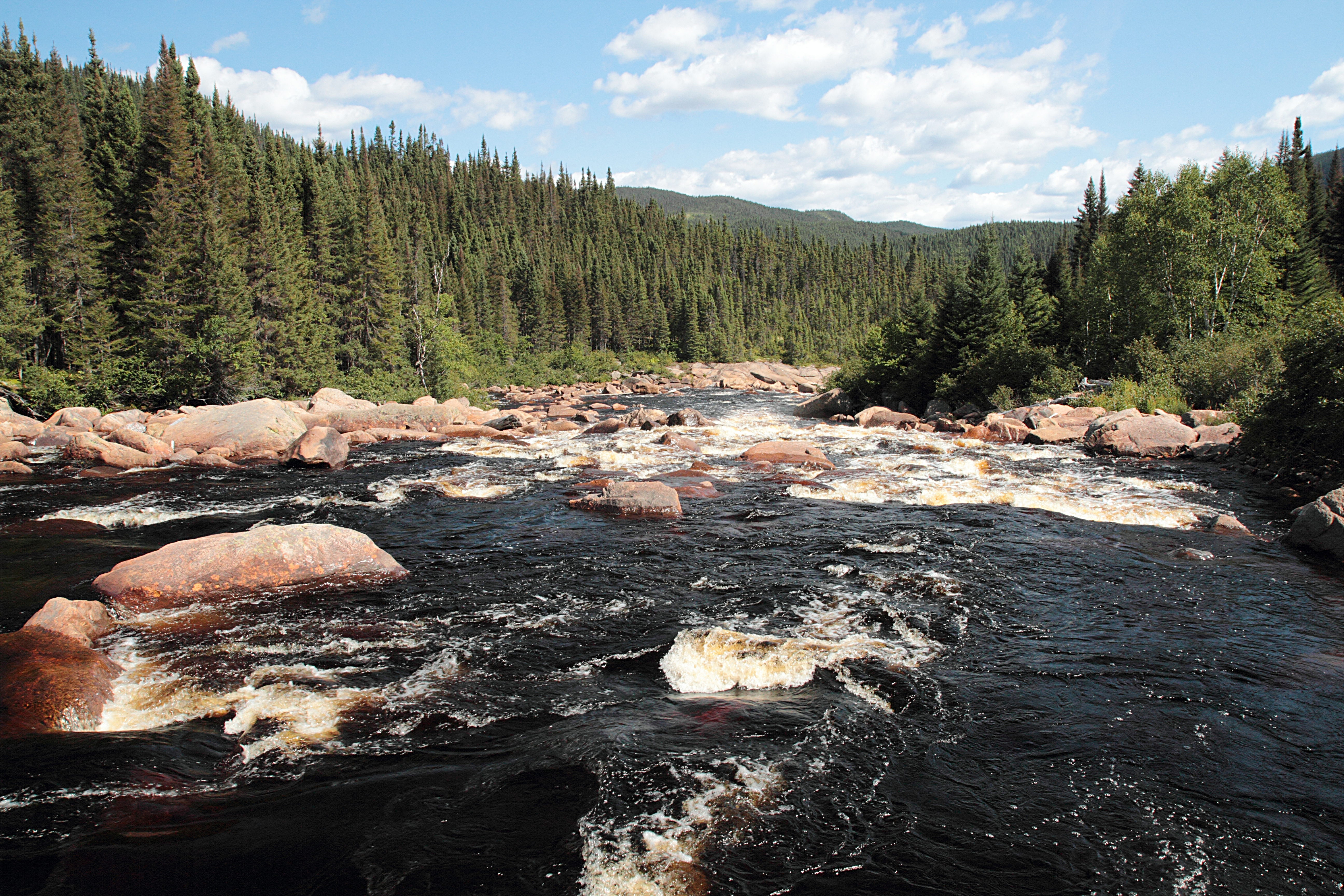 Rivière MacDonald, Réserve Faunique Port-Cartier-Sept-Îles, Québec, Canada